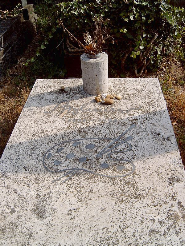 Bolmányi Ferenc (Léva, 1909. június 27. – Budapest, 1990. július 14.) festő sírja Budapesten. Kozma utcai izraelita temető 5B-9-32